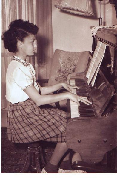 דיצה תמיר מנגנת בפסנתר של משפחת תמיר